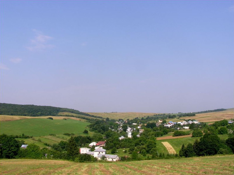 Celkový pohľad